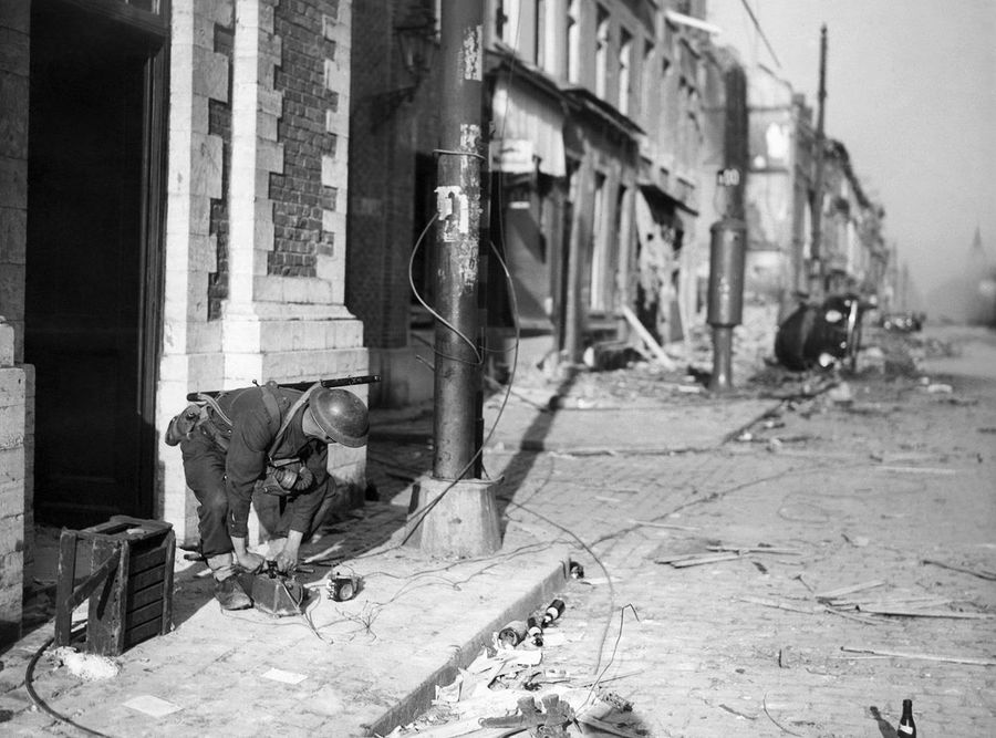 1940: Een Britse soldaat blaast de brug over de sporen bij de Tiensesteenweg op ter verhindering van de opmars van de Duitsers